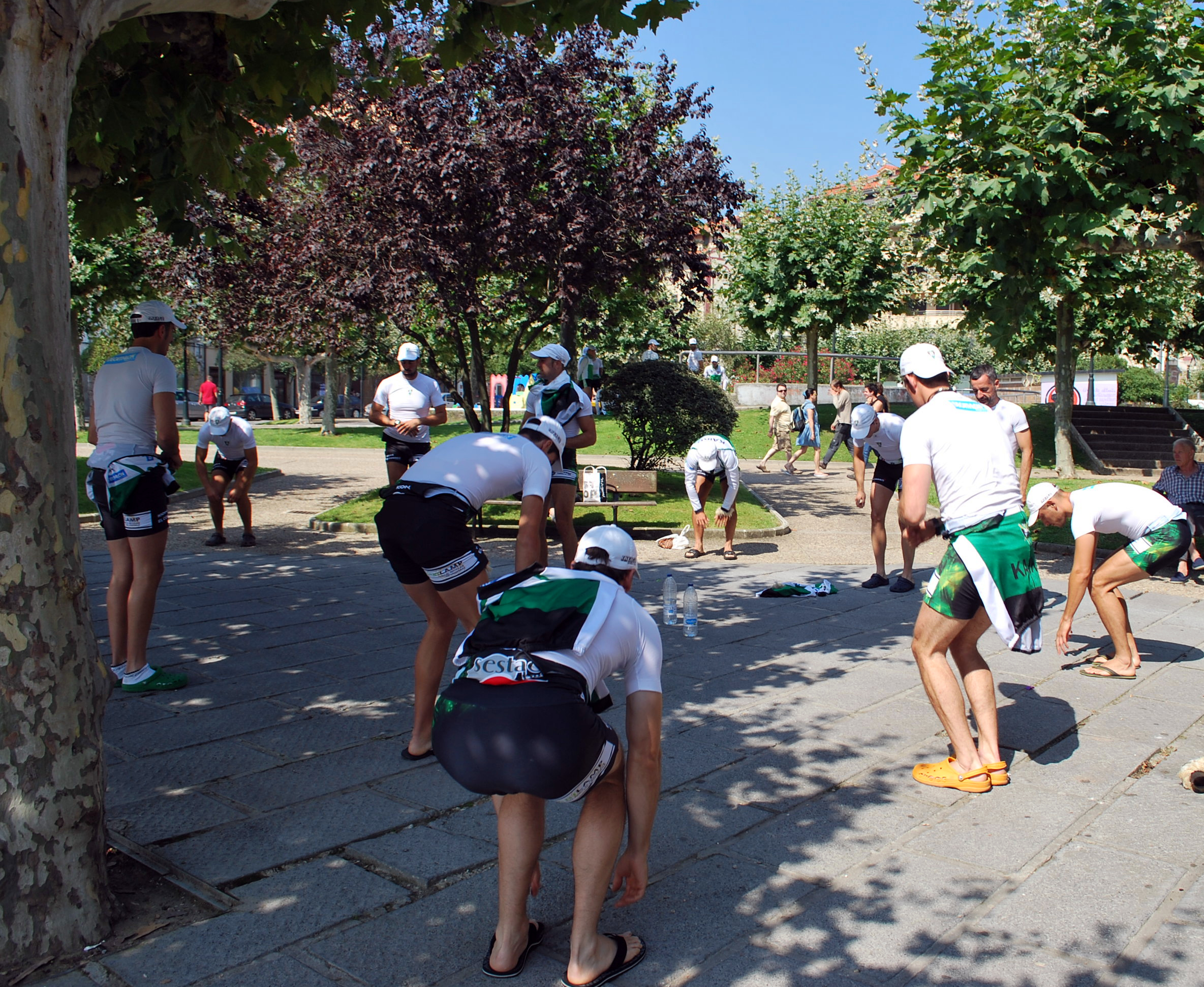 Calentamiendo del equipo de la Sociedad Deportiva de Remo Kaiku de Sestao en Zumaya e 31 de julio de 2011.